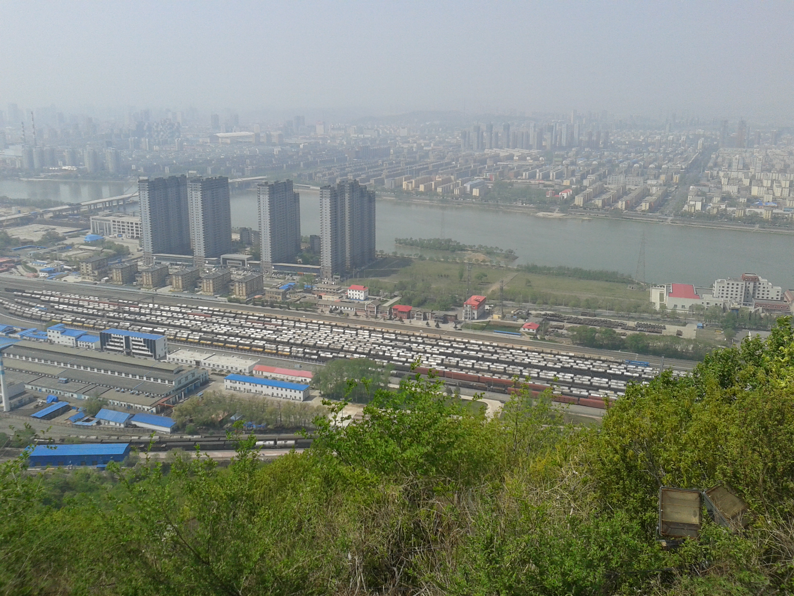 中文（中国大陆）: 远眺龙潭山站